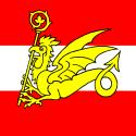 Blason de l'Ajoie, située dans le canton du Jura en Suisse. Origine: document personnel.